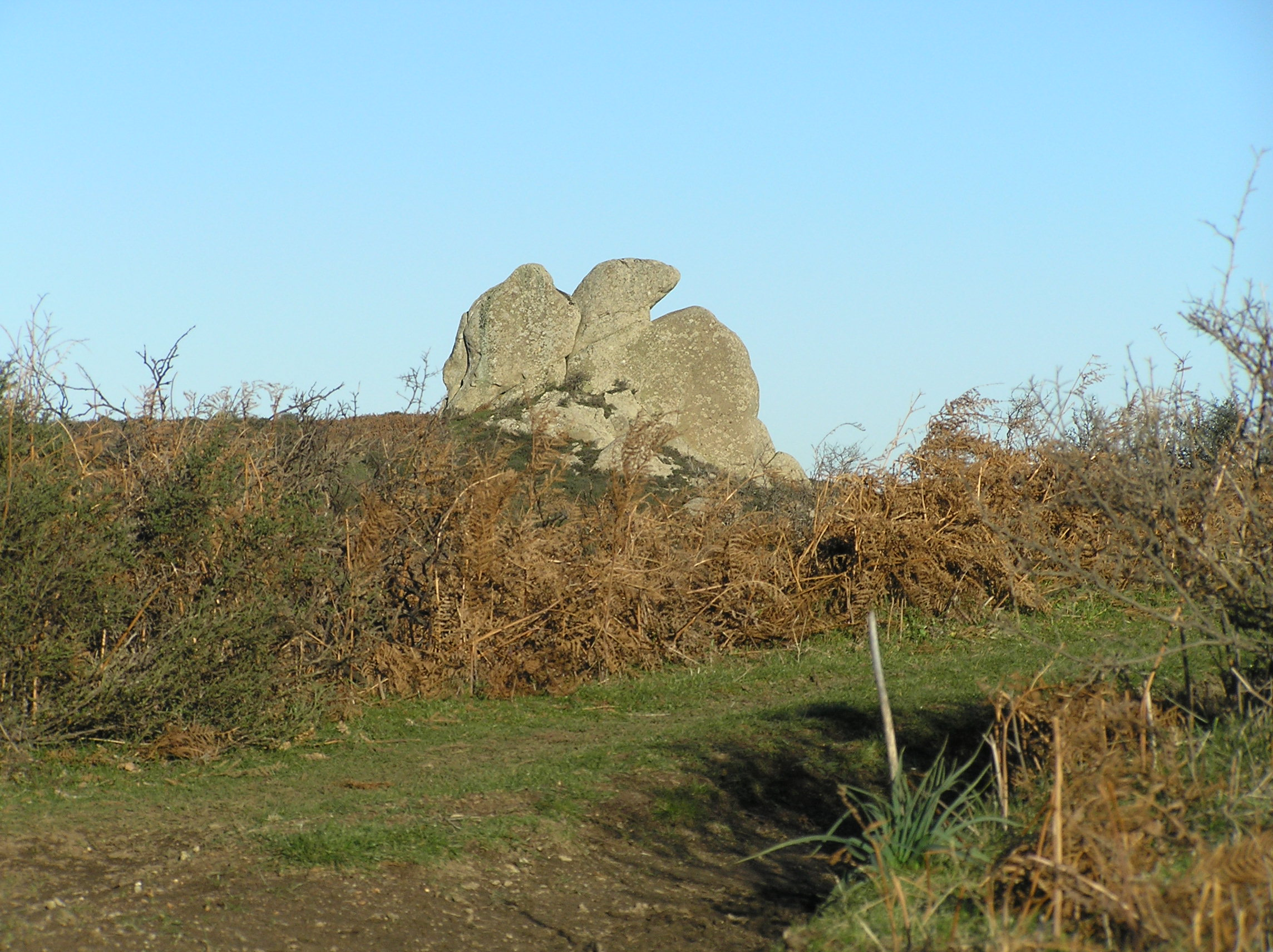 Rochers naturels.